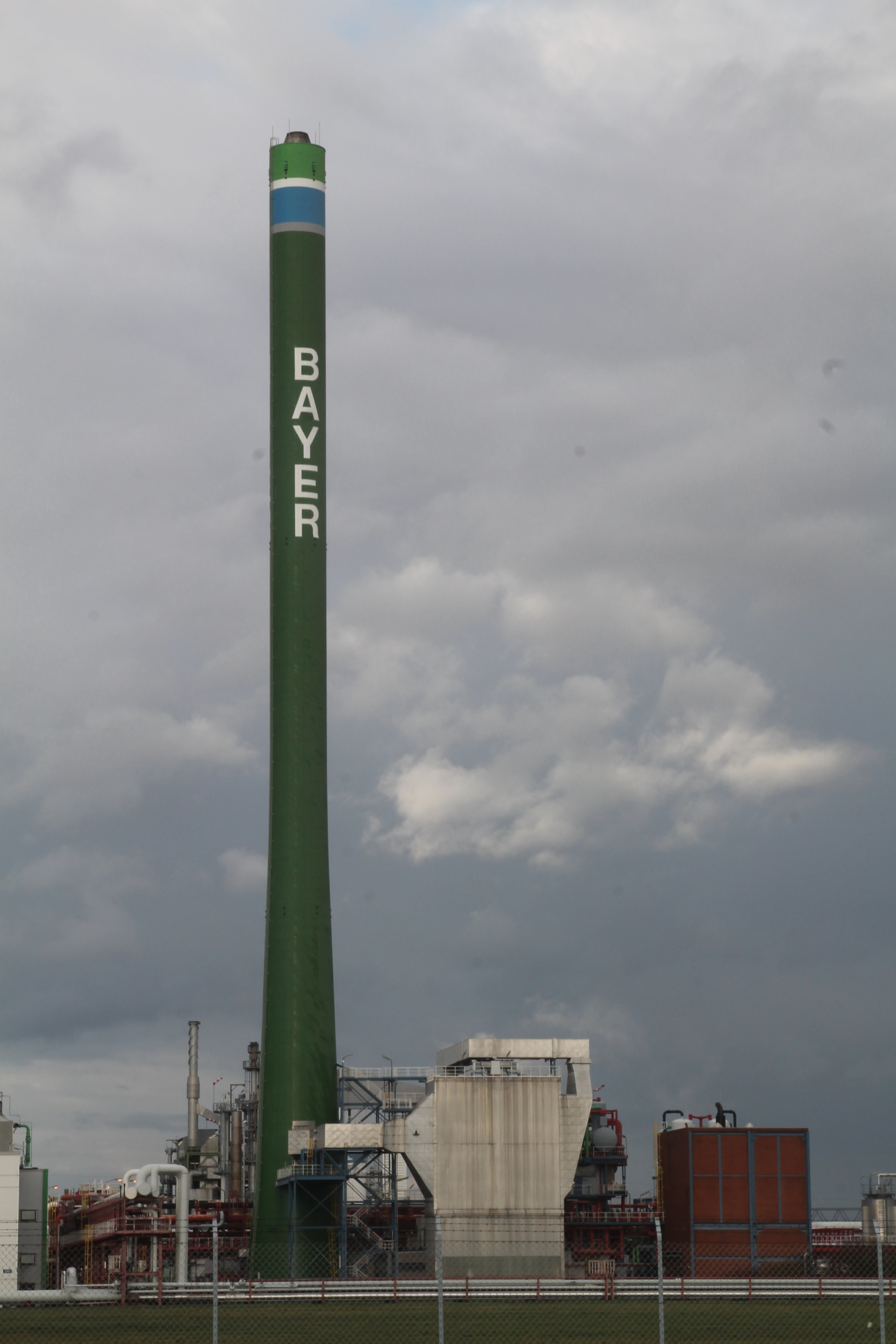 Kamin der Bayer-Werke Brunsbüttel (ehem. Bayer MaterialScience, seit 2015 Covestro)